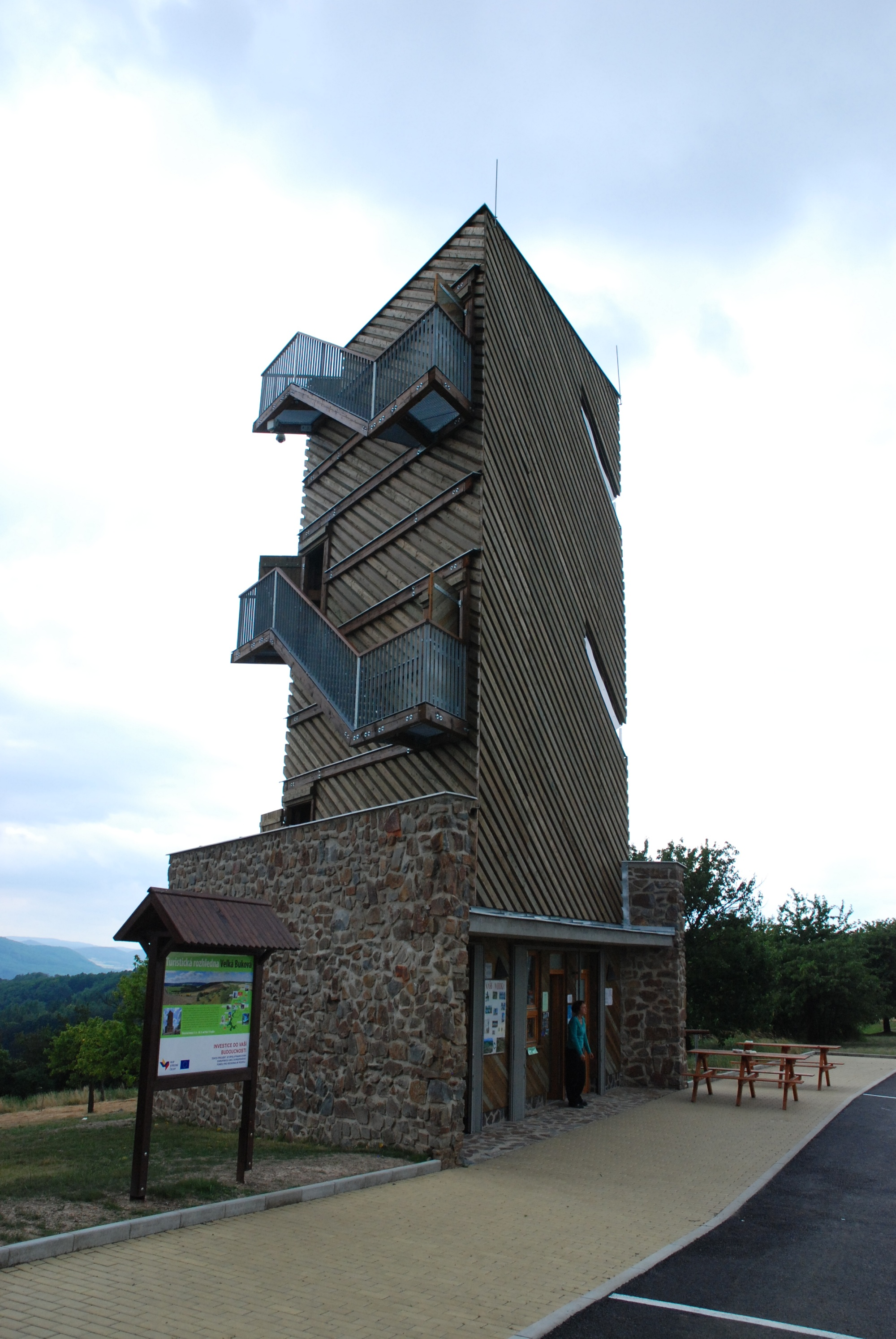 Celkový pohled na rozhlednu Velká Buková